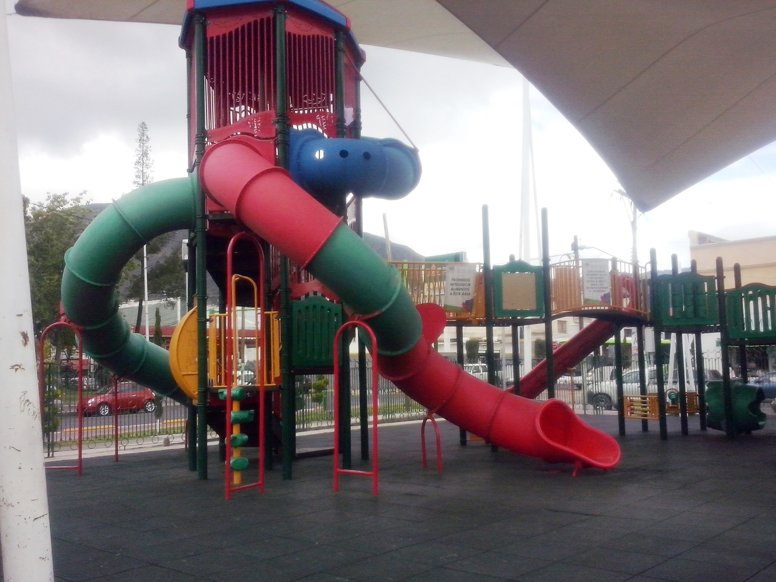 Jardín del Maestro en Pachuca, Hidalgo